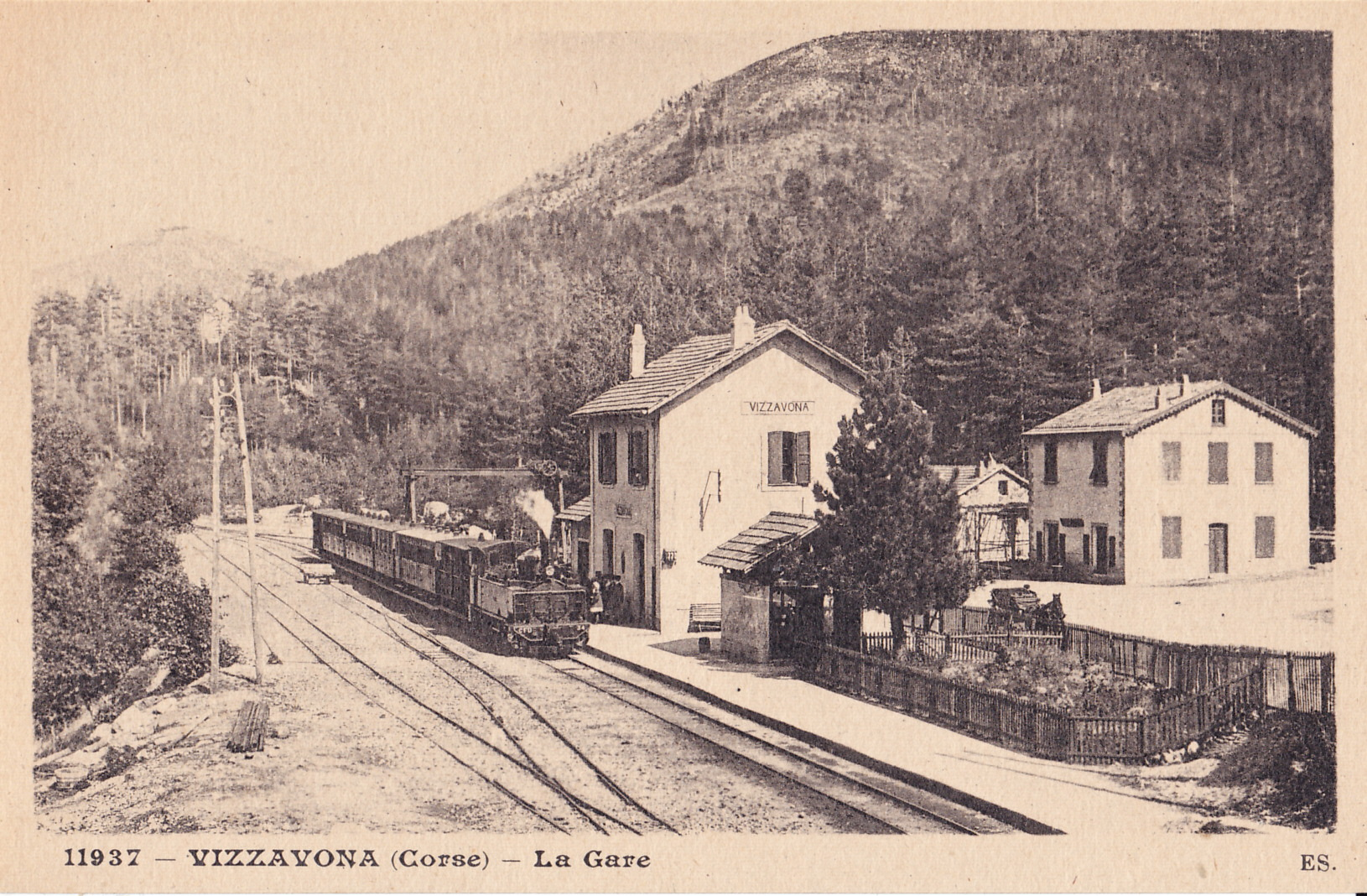 Carte postale ancienne éditée par ES, n°11937 : VIZZAVONA - La Gare. Un train de voyageurs en provenance de Bastia et à destination d'Ajaccio pendant l'arrêt en gare de Vizzavona, remorquée par la 031T Fives-Lille n° 34, pendant les premières années de l'exploitation.